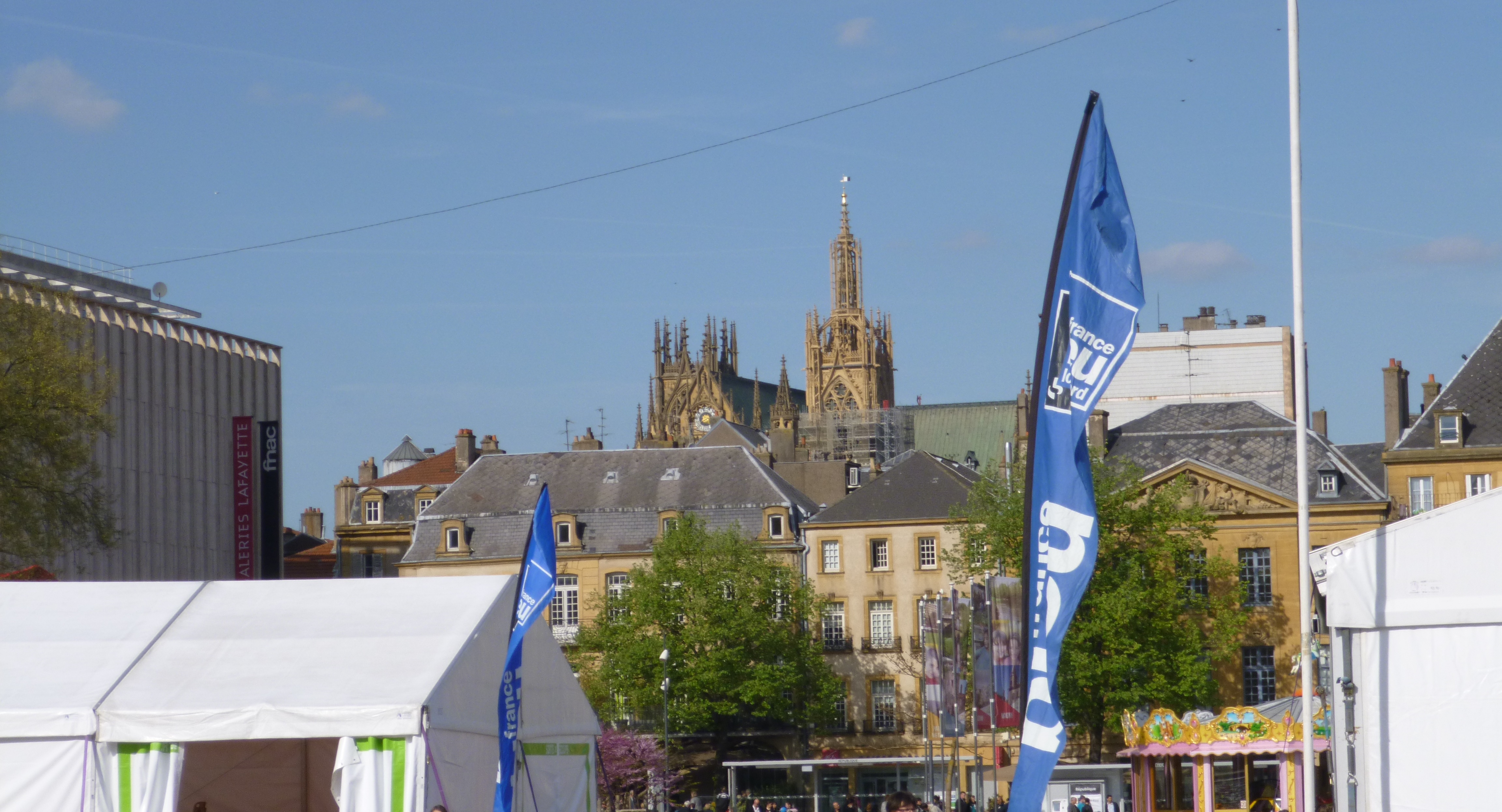 Vue sur la façade de la cathédrale de Metz depuis la place de la République lors de la manifestation "Littérature&Journalisme"